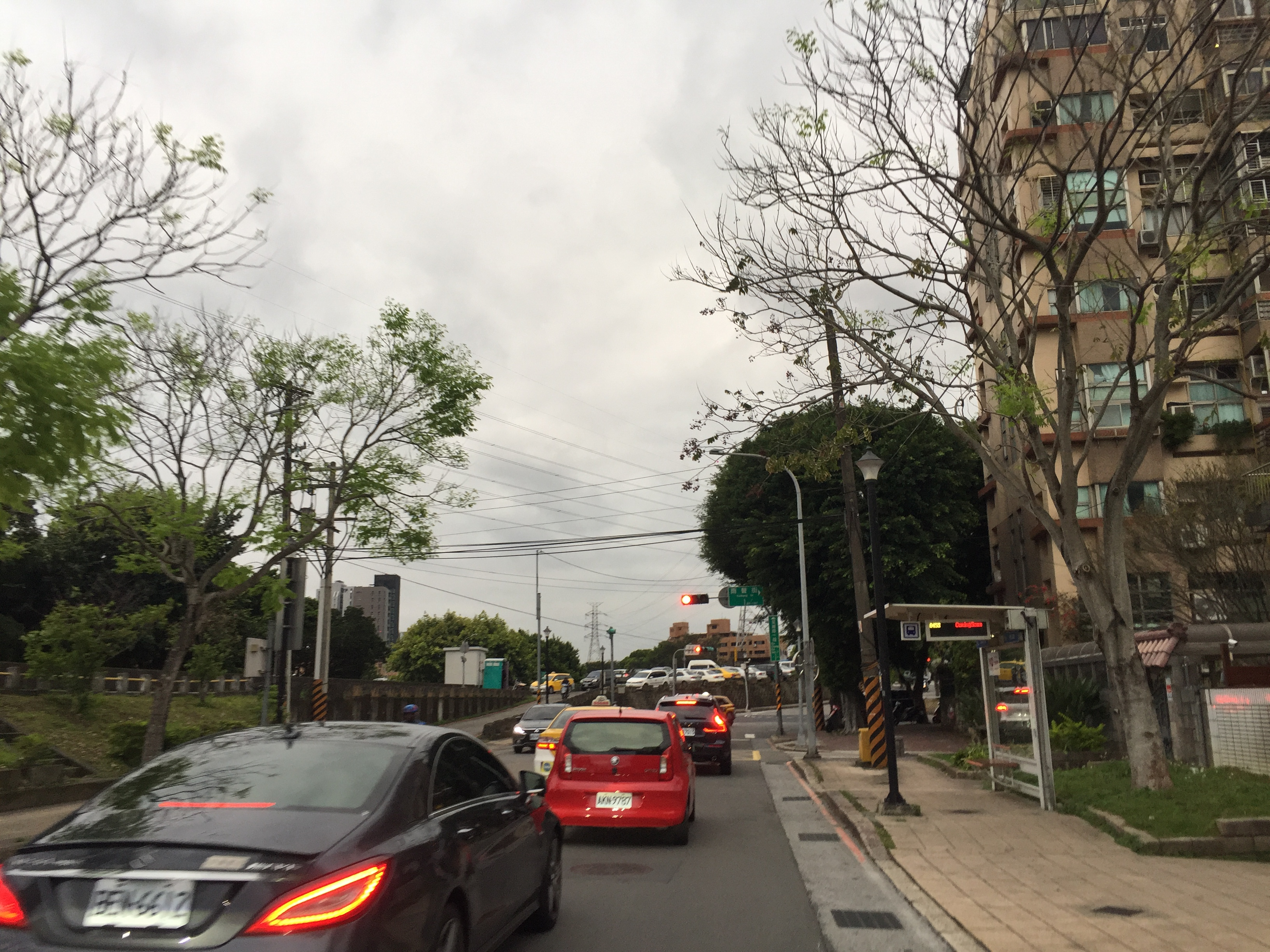 中文（台灣）: 台灣台北市士林區至誠路一段街景